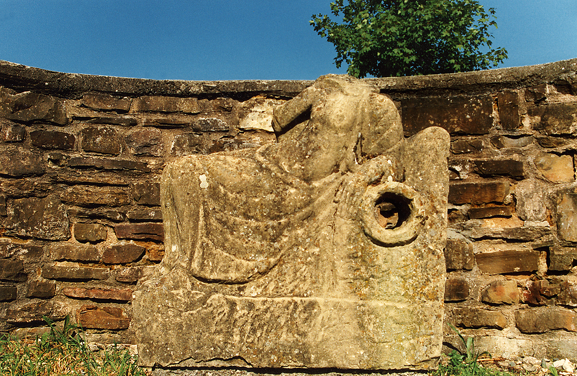 Kastell Schirenhof (Schwäbisch Gmünd, Ostalbkreis). Eine Quellnymphe im Bad. 1893 fanden erstmals wissenschaftliche Ausgrabungen an der Kastelltherme statt. Im gleichen Jahr fand dort bedauerlicherweise auch ein planloser Steinraub statt, bei dem das Standbild ans Licht geholt wurde. Daher ist der Ort der Auffindung innerhalb des Bades unbekannt.